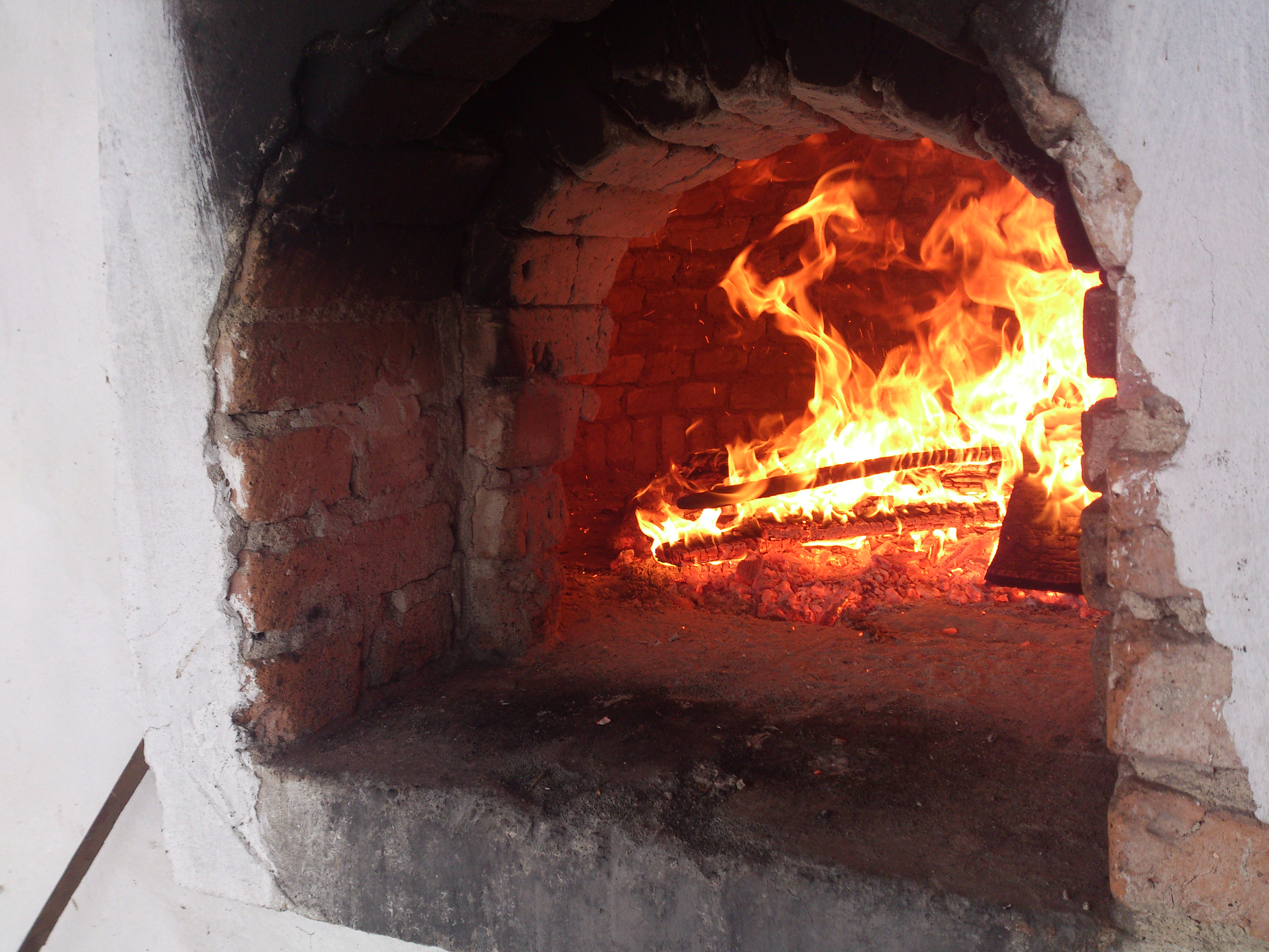 Фуруна за печење прасади. Користи се и за печење јагњади или рибе, а понекад се убацују и мање лепиње које добију посебан укус. Прасе се прво ставља у тзв. "пржуљу", посебан суд у којем се пече, и у њу је могуће додати црева прасета и џигерицу и тако се прави "мезалук". Додавањев воде у пржуљу након печења у њој остаје тзв. "моца" или "моча", која није баш најздравија, али пошто се једе пар пута годишње може да прође. Изузетно је слана и масна, и има јединствен укус. Фуруна на слици изграђена је крајем 20. века, и у њу могу да стану две пржуље.